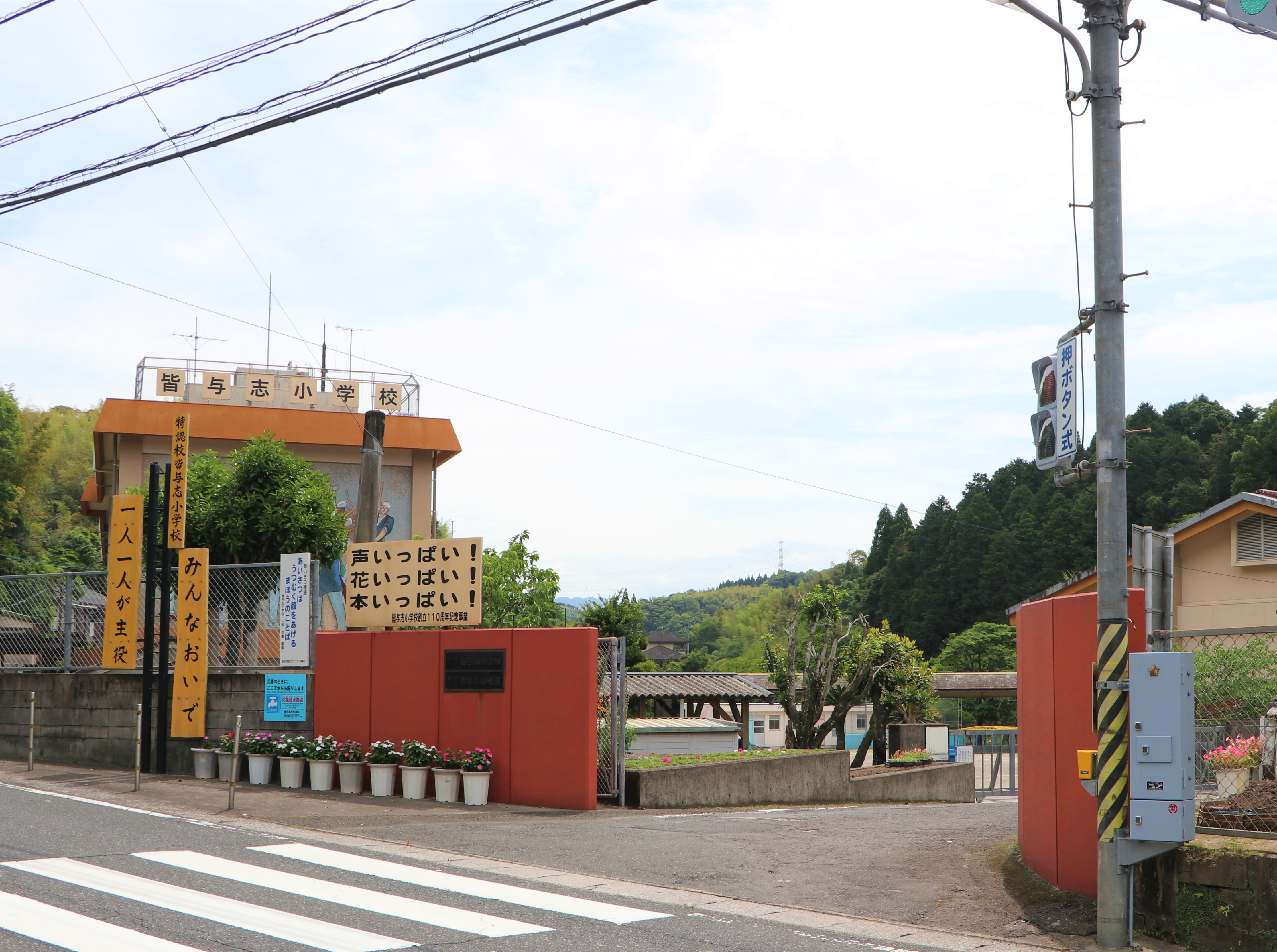 鹿児島市立皆与志小学校の外観。